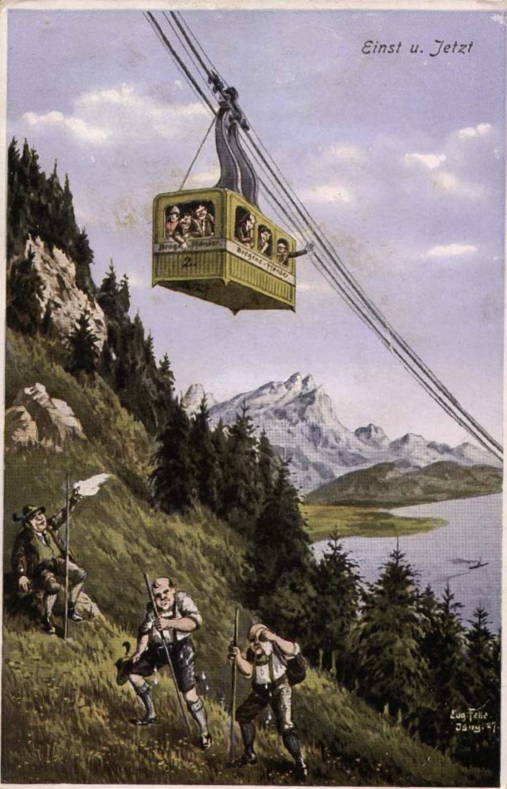 Bregenz, Pfänderbahn